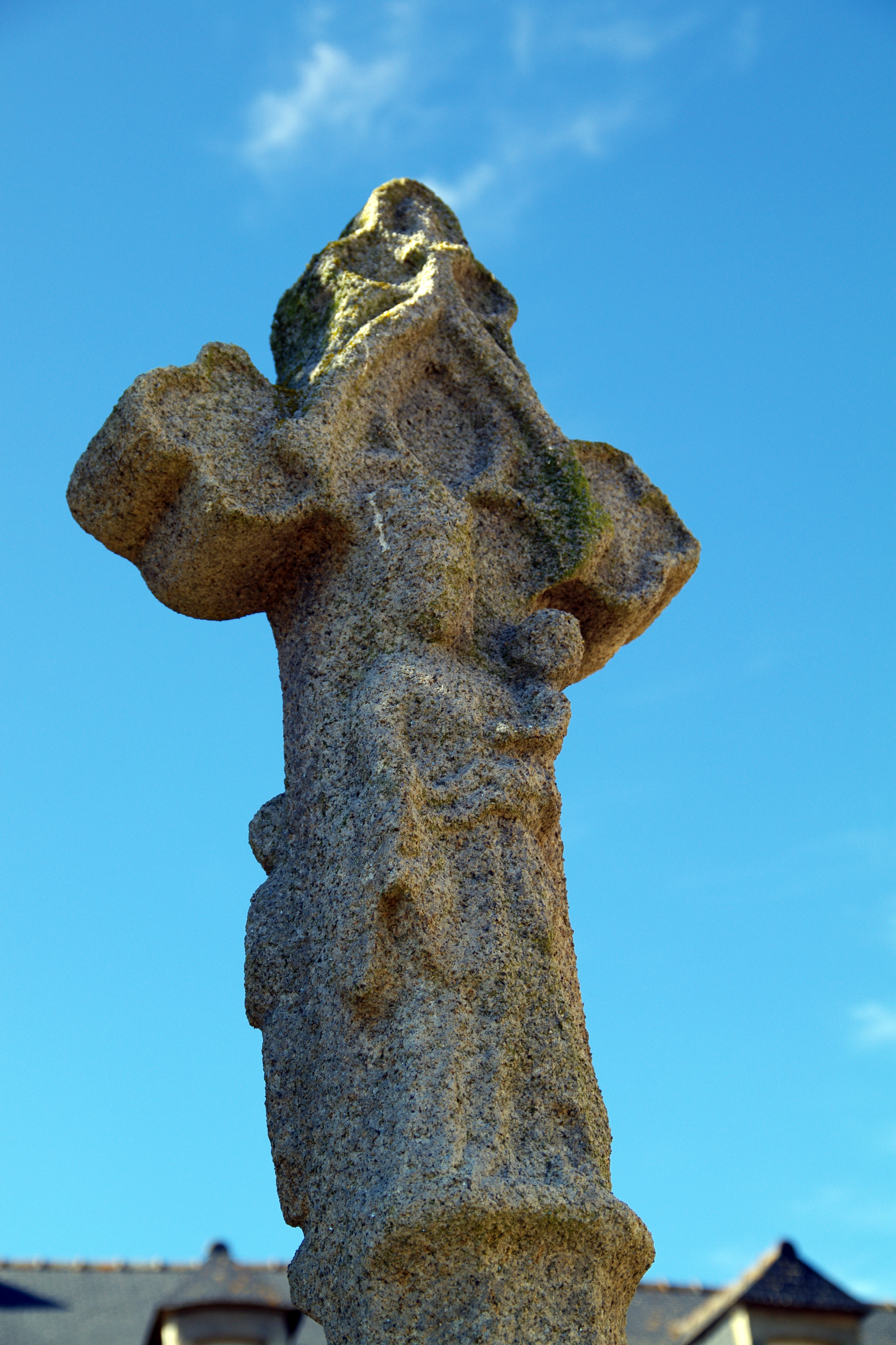 Croix en granit du 15e siècle, (Inscription, 1964) .